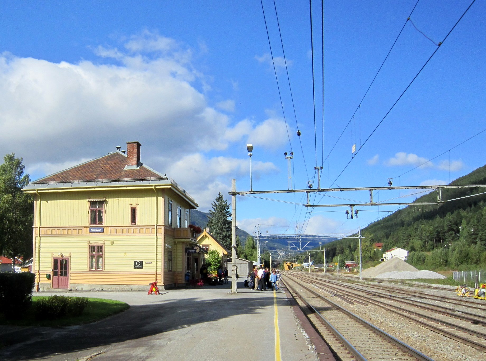 Nesbyen stasjon